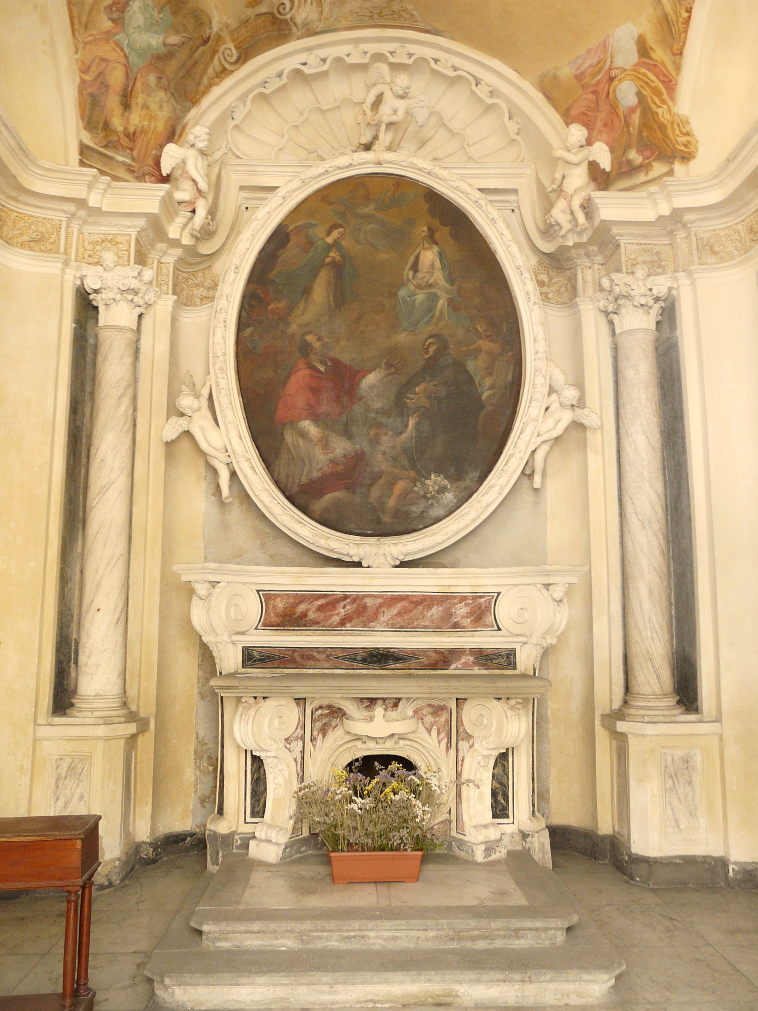 Altare dell'Oratorio di San Carlo, Fivizzano, Toscana, Italia